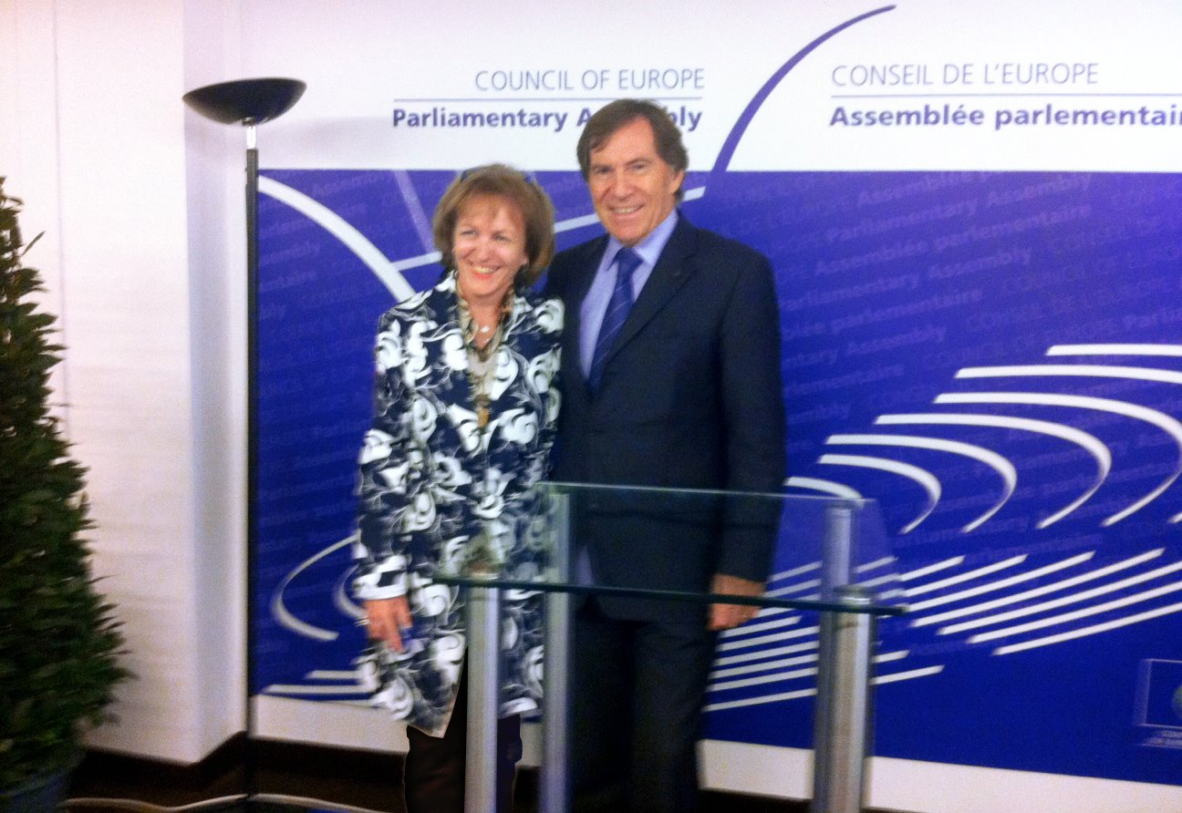 2006 - 2013 Council of Europe, Zv. Presidente e grupit politik te PPE (Partite Popullore Europiane). Lajla Pernaska me Jean Claude Mignon, President i Asamblese Parlamentare (2012 - 2014).